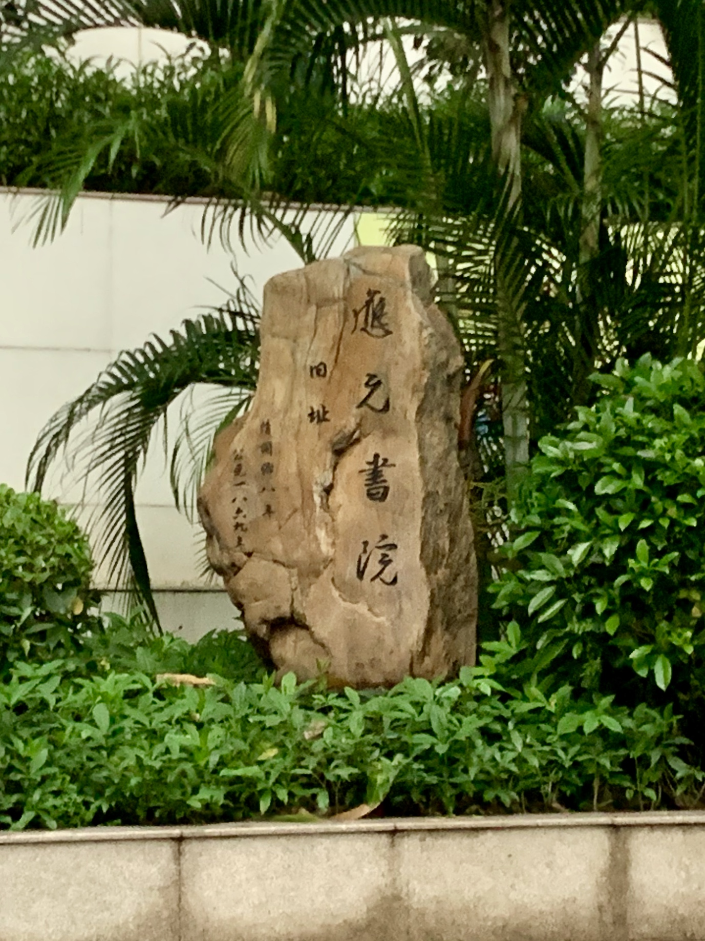 广州市第二中学应元路校区内的“应元书院”石碑